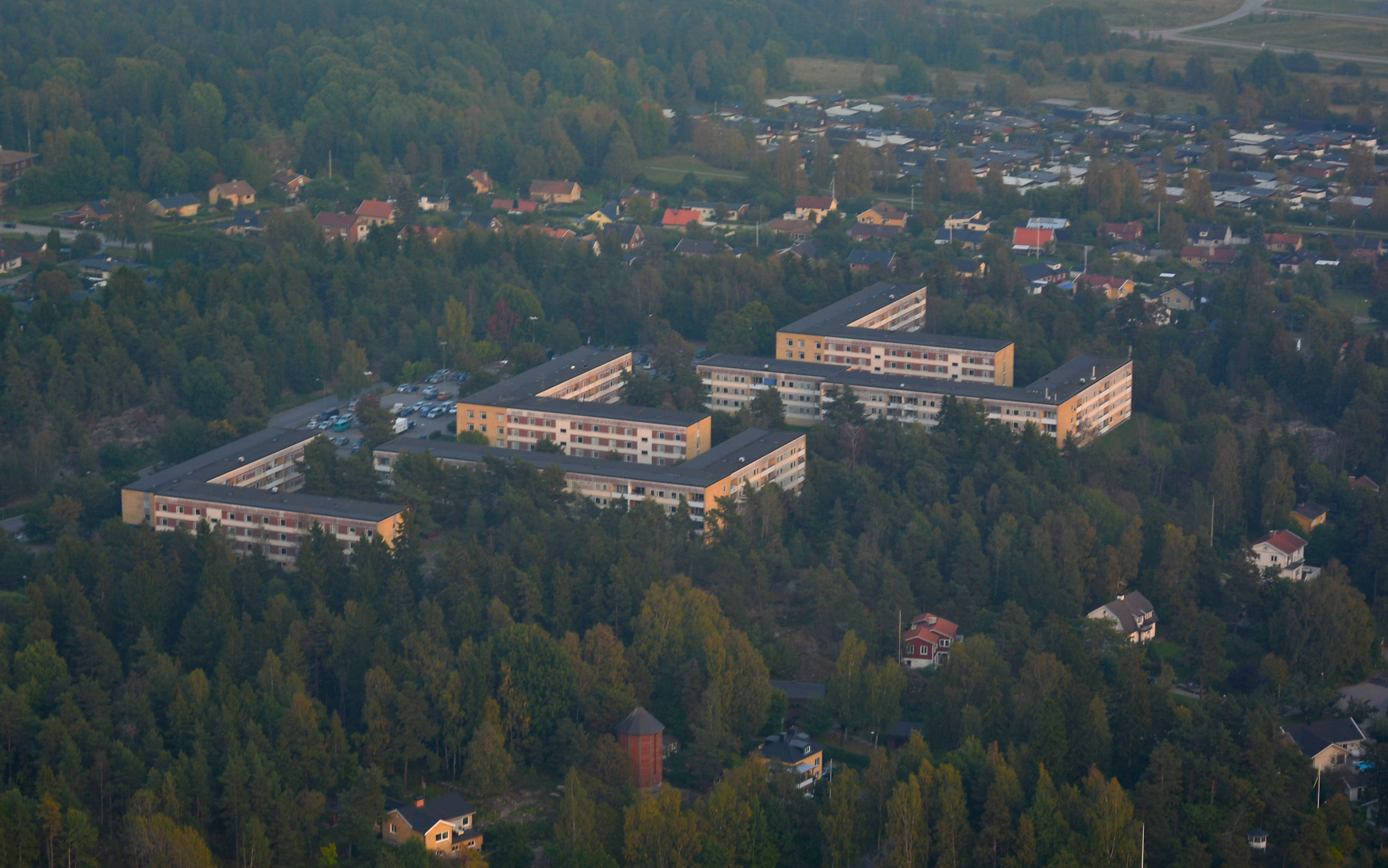 Östertälje